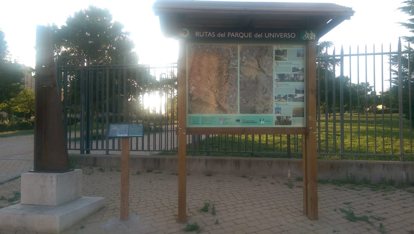 Entrada Parque del universo zona carteles rutas de senderismo. La escultura de al lado esta incompleta pues le falta la estatua que desapareció y se puede ver la marca donde estaba puesta